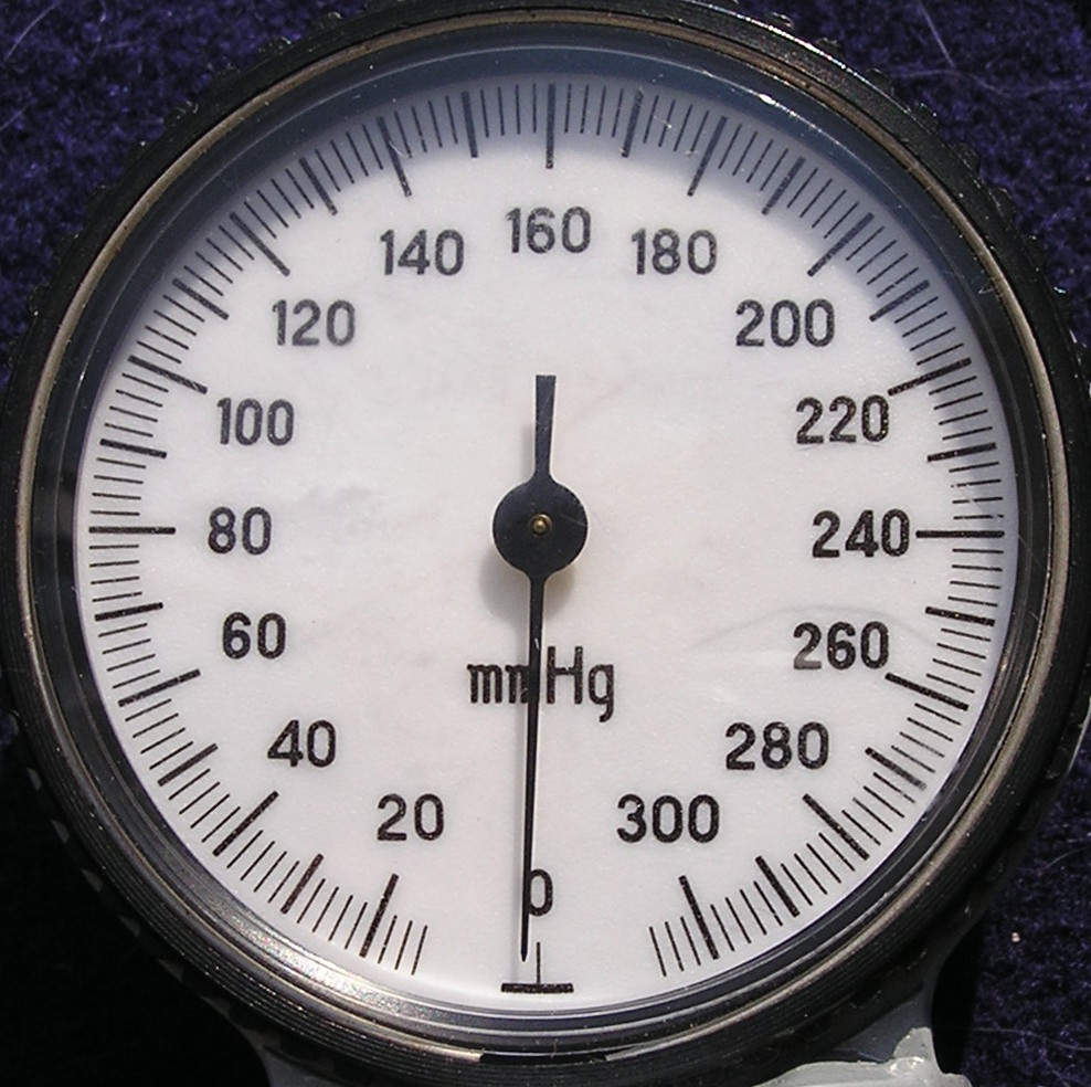 Цифровая шкала механического манометра для неинвазивного измерения артериального давления.